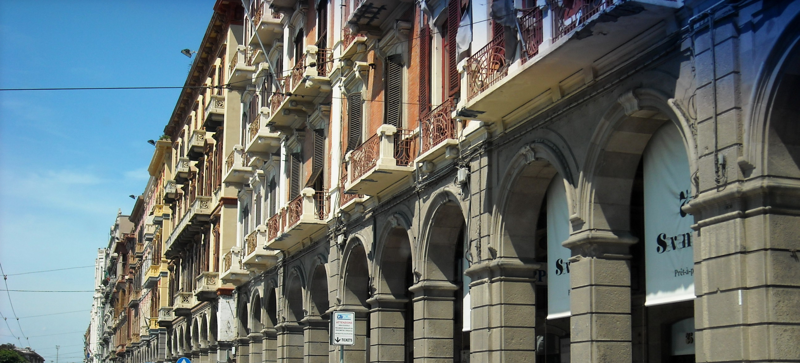 Palazza di Via Roma (Cagliari)